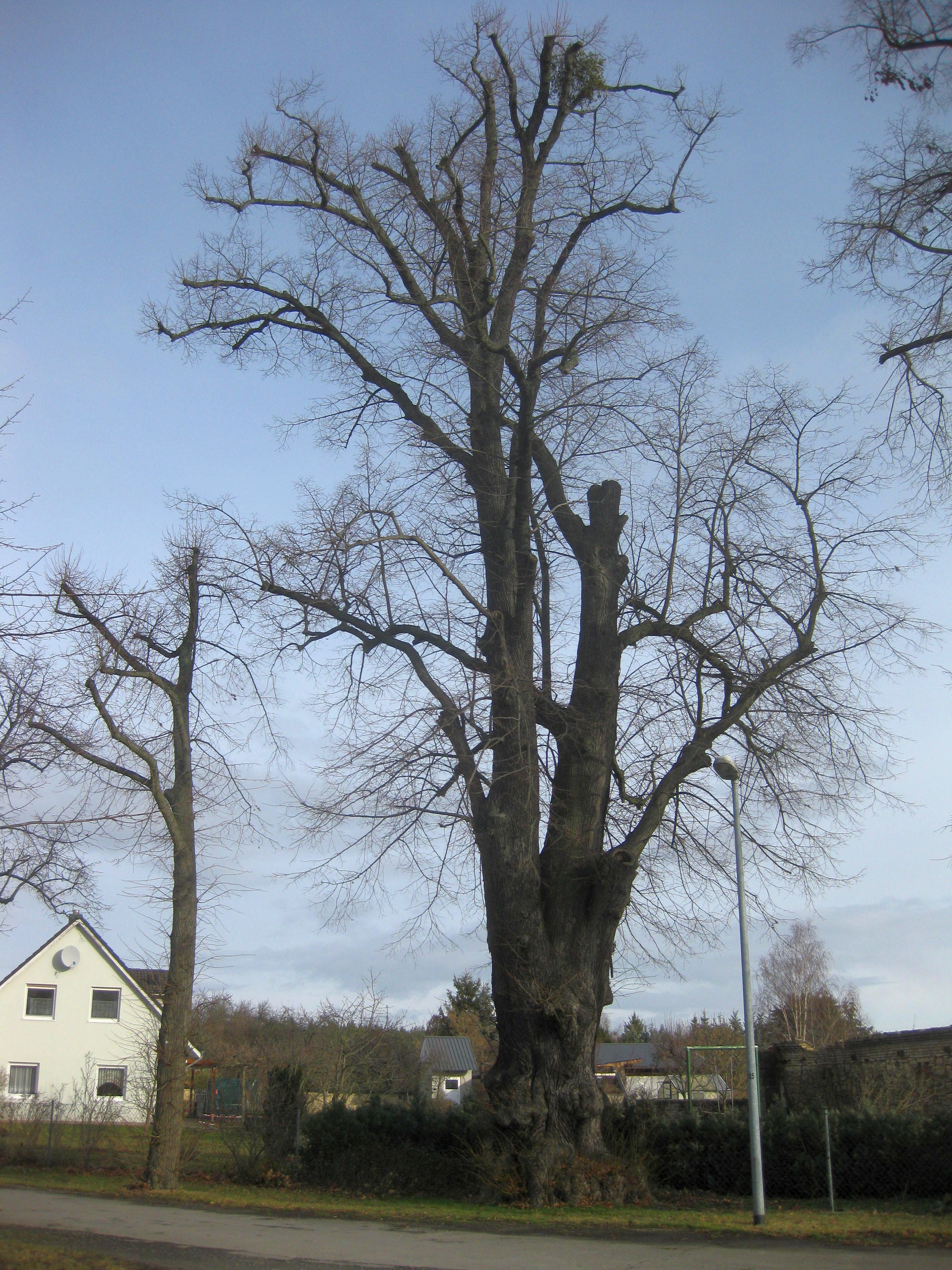 Grünewald, Platz der Volkssolidarität, Sommerlinde (Tilia platyphyllos, Naturdenkmal) Südwestansicht, Vorwinter; 70 m rückwärtig zu Hauptstraße 2